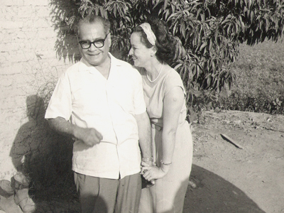 El escritor peruano Arturo D. Hernandez y su esposa Talma San Martín probablemente en Iquitos, Perú.